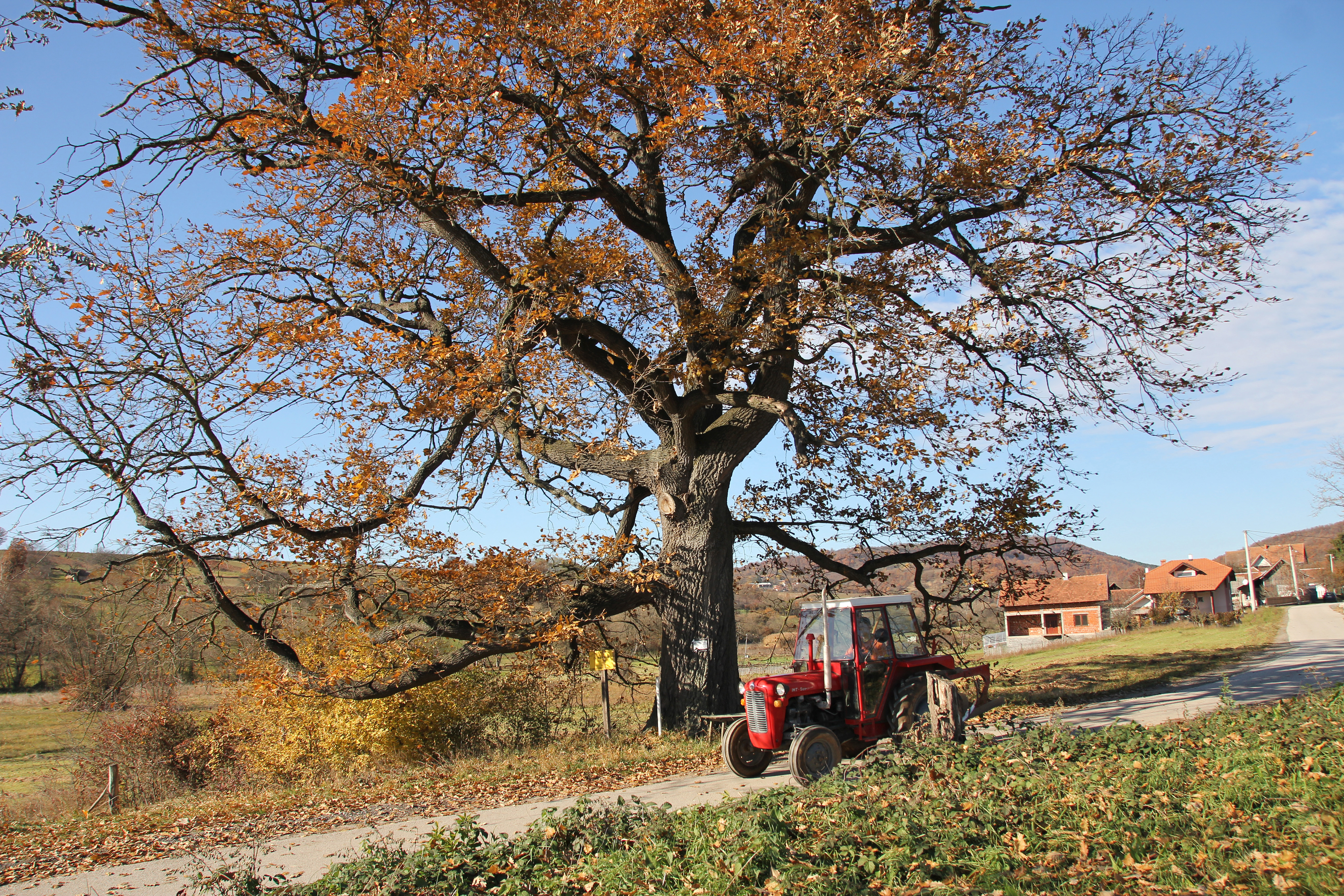 Donja Crnuća kod Gornjeg Milanovca, hrast-zapis